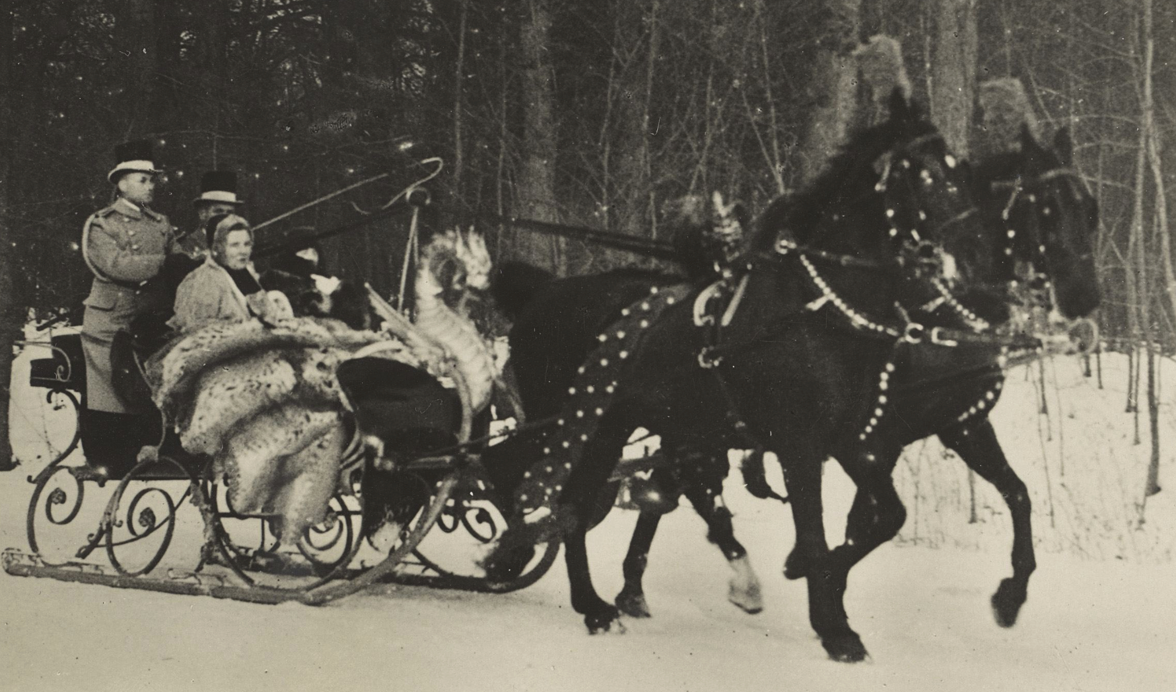 IdentificatieTitel(s): Wilhelmina, koningin der Nederlanden, Juliana, koningin der Nederlanden, en Beatrix, koningin der Nederlanden, in een arreslee te Den HaagObjecttype: foto prentbriefkaart Objectnummer: RP-F-00-7566Omschrijving: Wilhelmina, Juliana en Beatrix in een arreslee met twee paarden te Den Haag. Achter op de arreslee staan twee mannen.VervaardigingVervaardiger: fotograaf: Gompers (vermeld op object)uitgever: W. ten Have (vermeld op object)Plaats vervaardiging: fotograaf: Den Haaguitgever: AmsterdamDatering: 24-jan-1940Fysieke kenmerken: fotografieMateriaal: fotopapier Techniek: fotografieAfmetingen: h 90 mm × b 139 mmToelichtingDe hier vermelde titel verwijst naar de hoogst verkregen titel van de geportretteerde, niet per se naar de titel die de geportretteerde op deze voorstelling draagt.OnderwerpWat: animal traction, animal-drawn vehicle (carriage etc.)Waar: Den HaagWie: Wilhelmina (koningin der Nederlanden)Juliana (koningin der Nederlanden)Beatrix (koningin der Nederlanden)Verwerving en rechtenVerwerving: onbekend 2014Copyright: Publiek domein